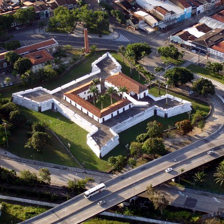 Forte das Cinco Pontas